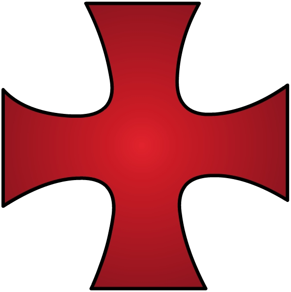 Tatzenkräiz.